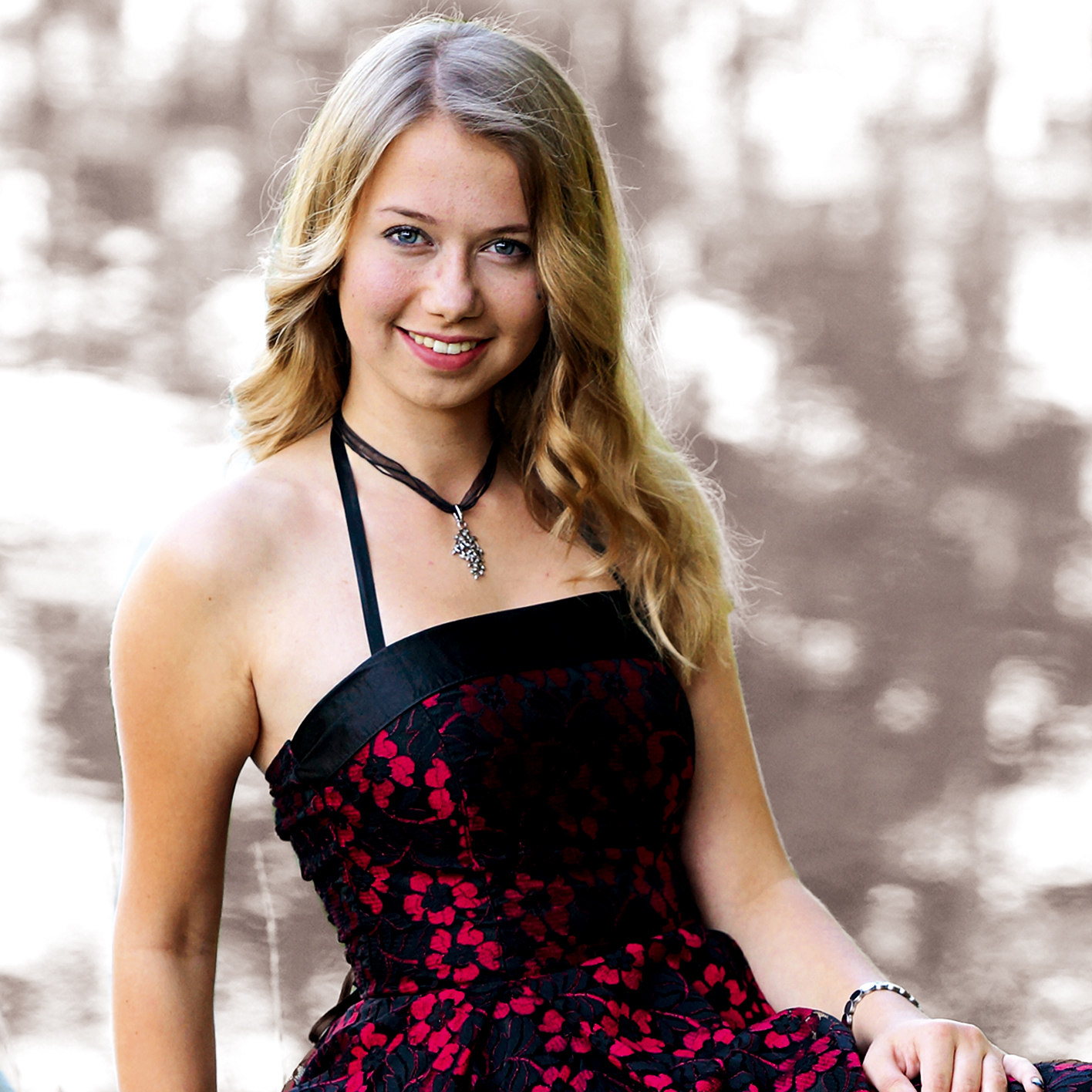 Laura Kamhuber Cover